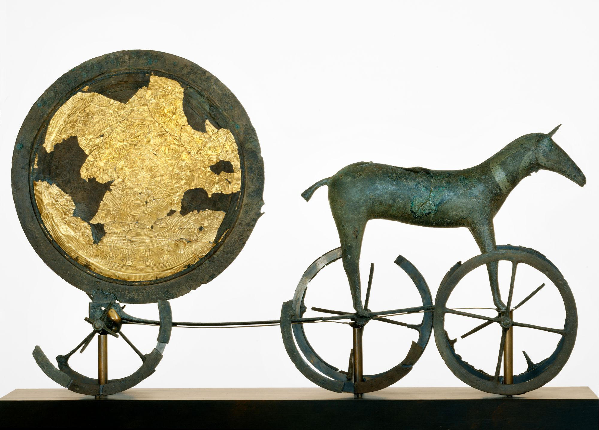 Solvognen, natsiden synlig. Bronzealder, votiv/depot.